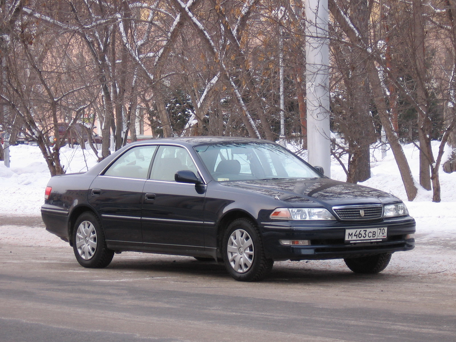 Photo taken in Tomsk, Russia